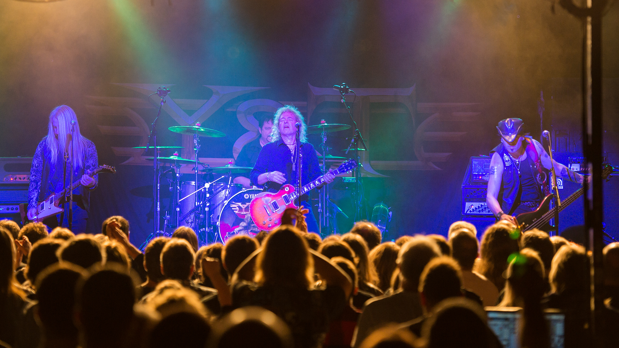 Aaron Leigh,Concertbüro Franken,Dave Meniketti,Der Hirsch,John Nyman,Konzert,Livekonzert,Livemusik,Mike Vanderhule,Musik,Y&T